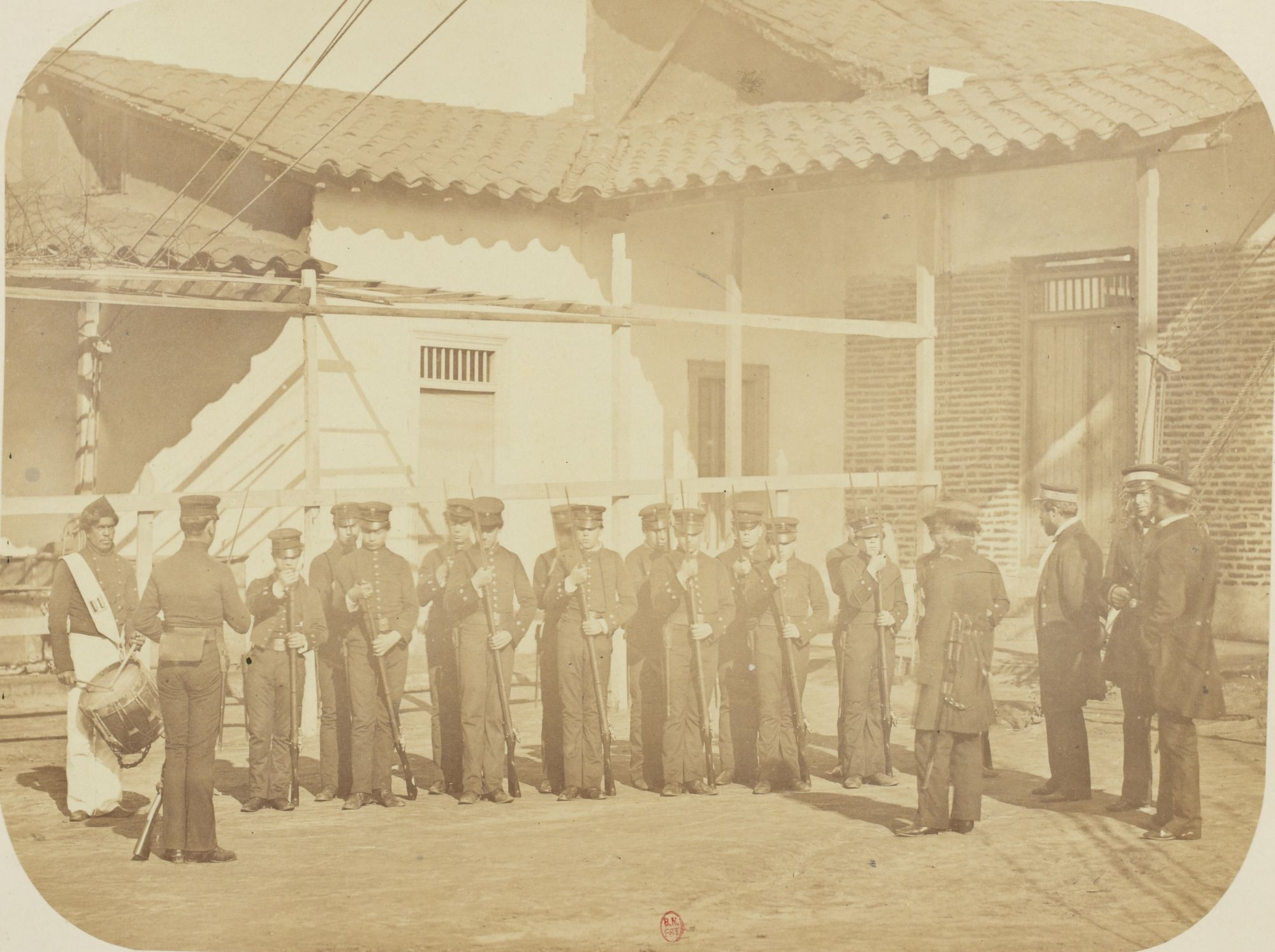 Cadetes de la Escuela Naval de Valparaíso en 1860. Ejercicios con fusil.